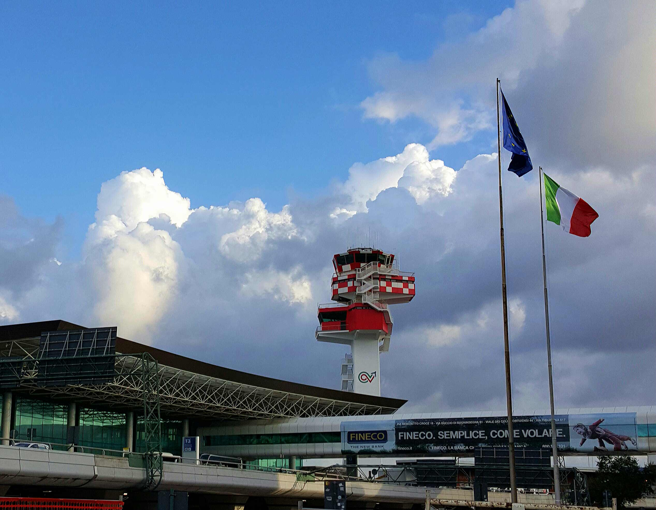 Torre di Controllo ENAV dell'Aeroporto di Roma-Fiumicino ristrutturata ad ottobre 2015